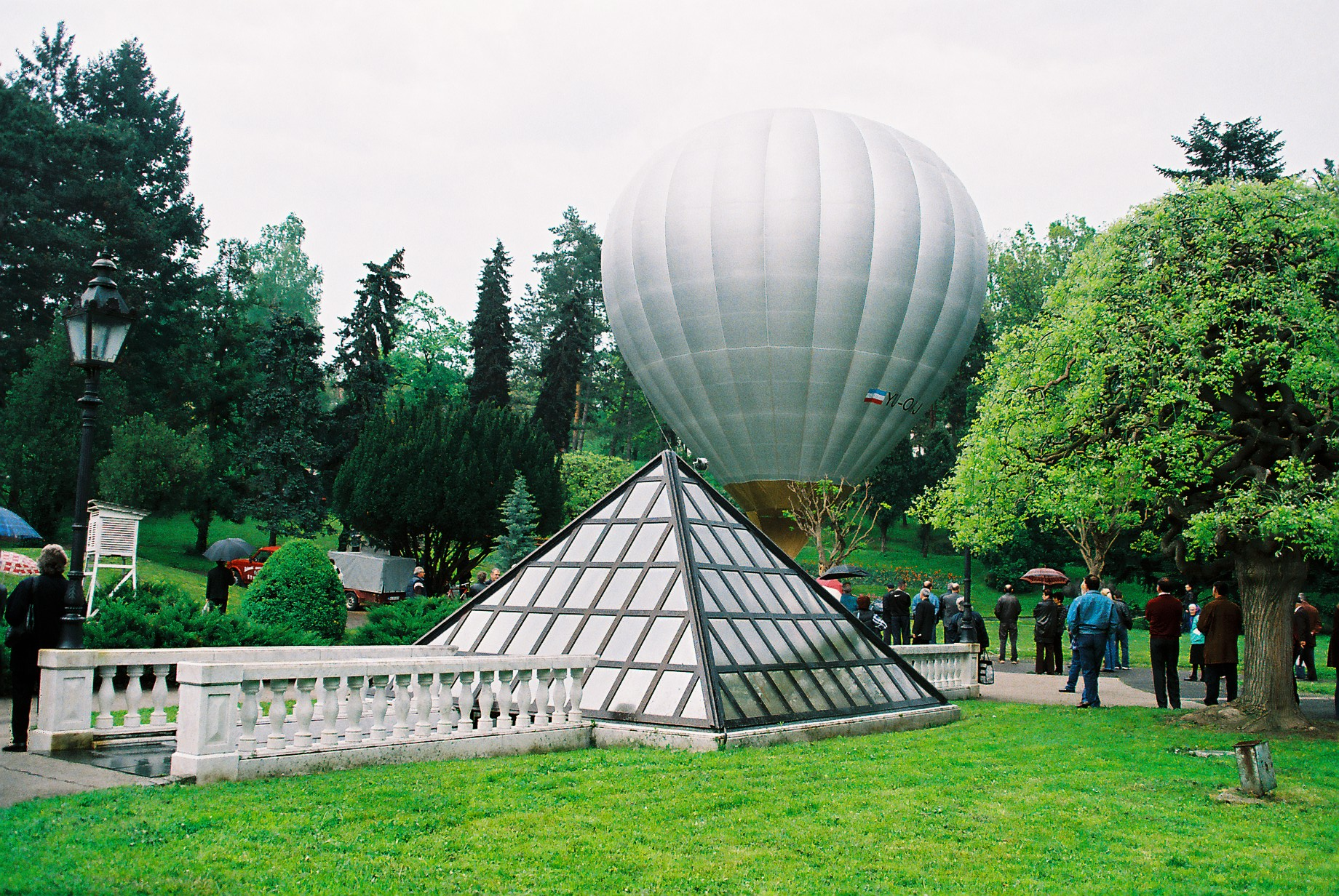 Vrnjačka Banja - Rimski izvor